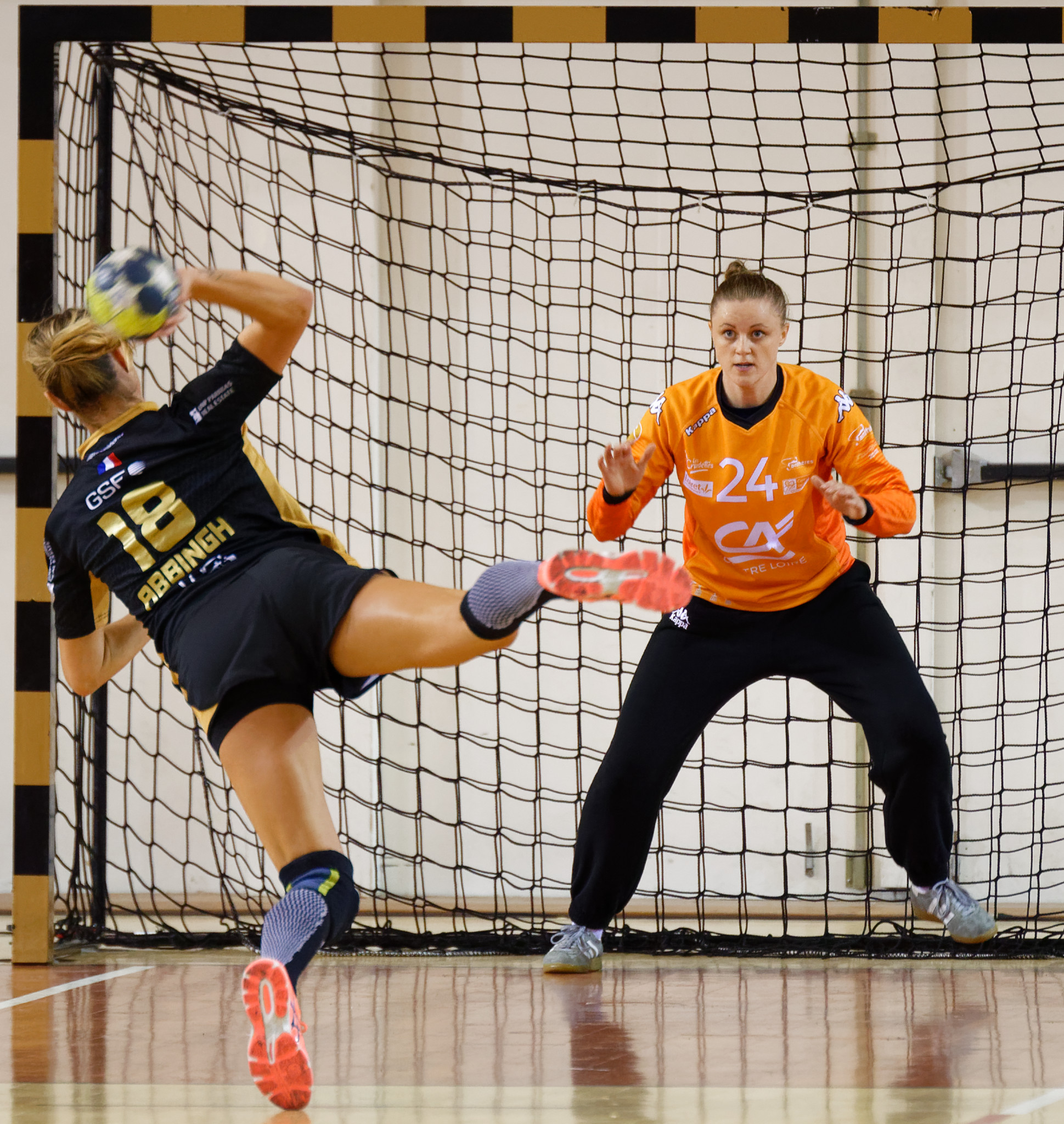 Adrianna Płaczek lors de la rencontre Issy Paris / Fleury. Le 03 septembre 2017 à Issy Les Moulineaux.